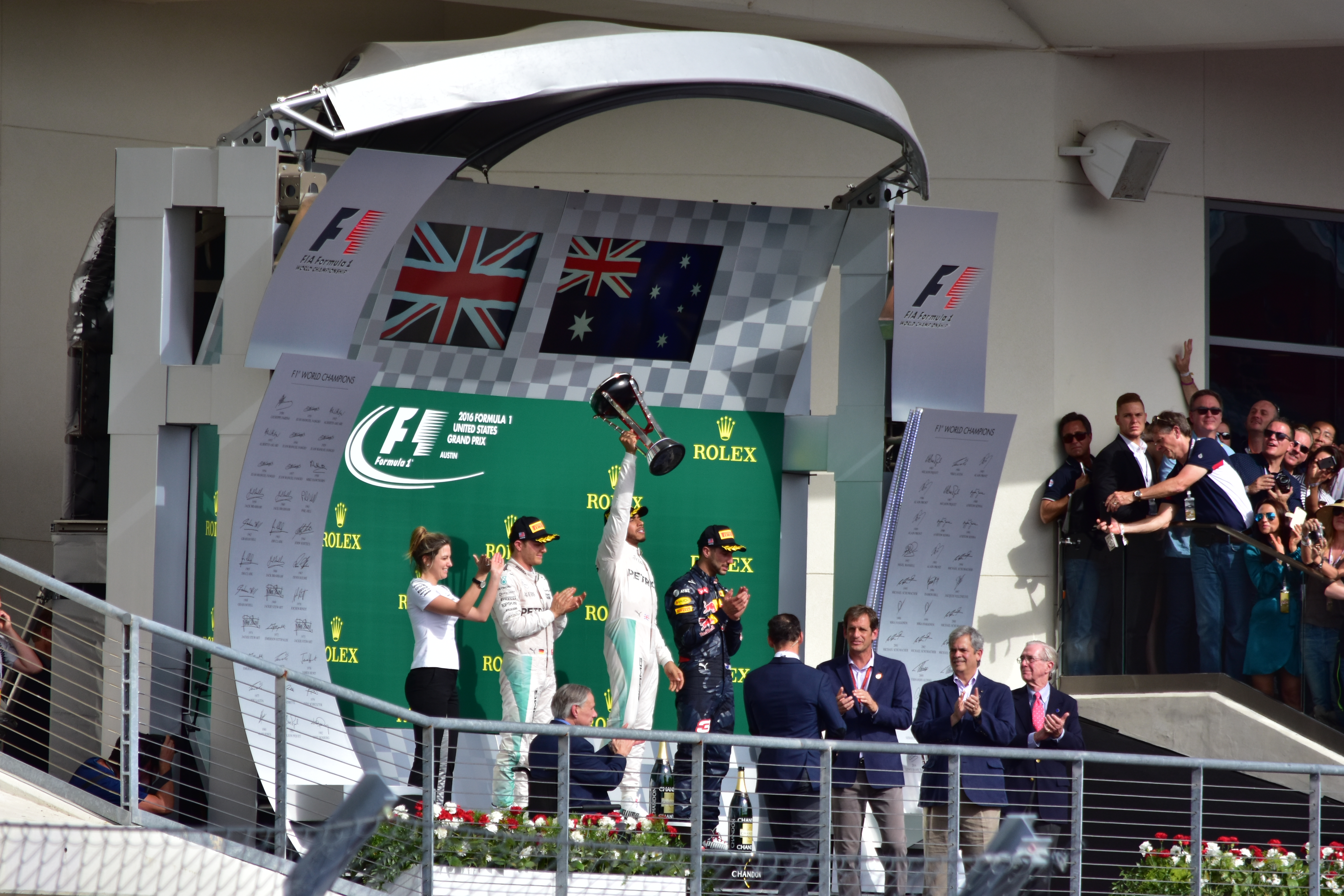 Podium celebration